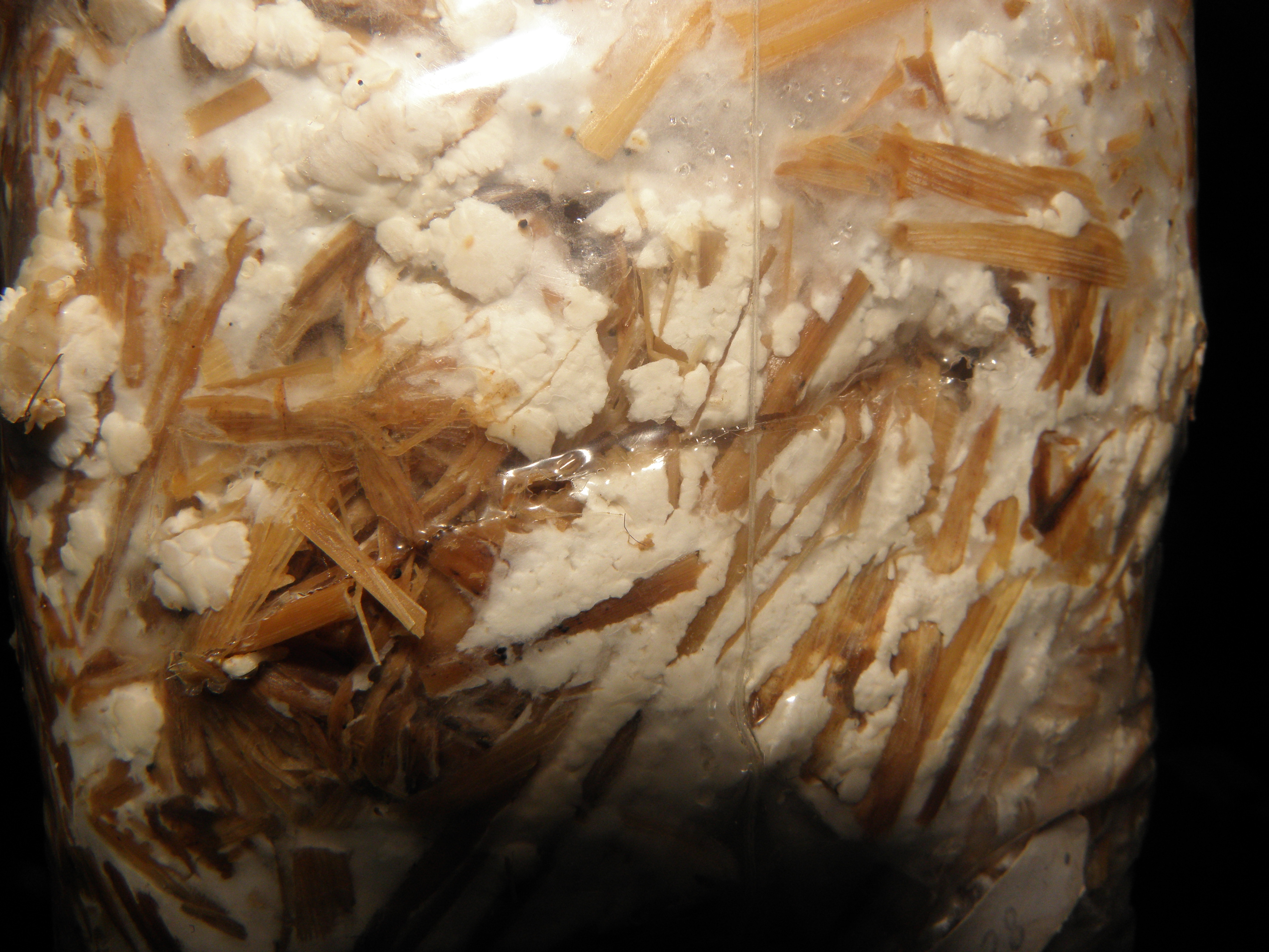 Mycelium of Pleurotus ostreatus